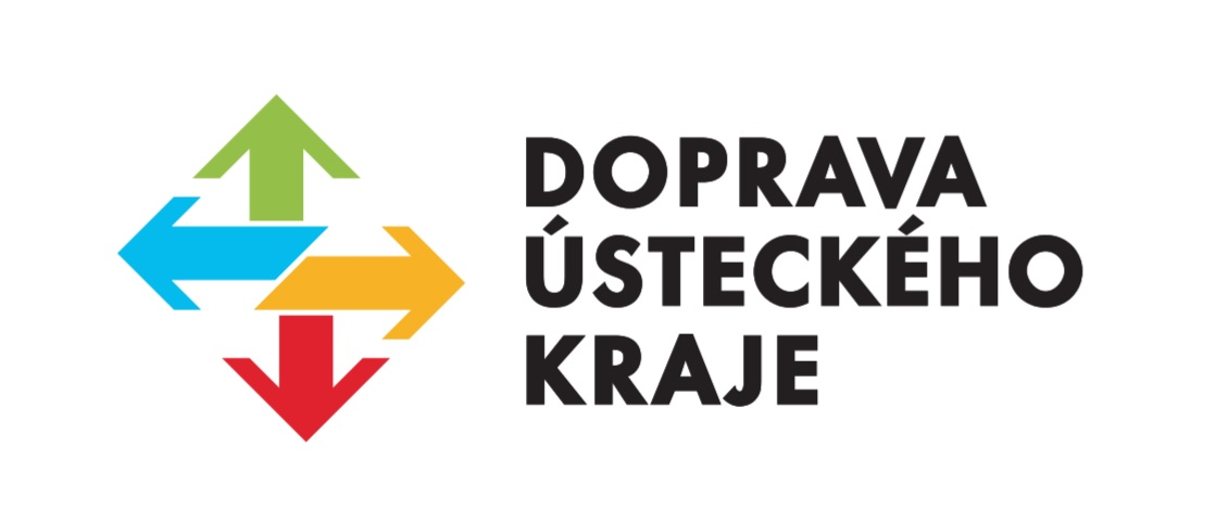 Logo DÚK